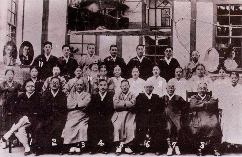 1937년 정월 초하루 평양산정현교회의 제직원 일동사진. (앞줄 왼쪽부터) 조만식 장로, 김동원 장로, 박정익 장로, 주기철 목사, 유계준 장로, 김봉순 장로, 오윤선 장로, 김찬두 장로